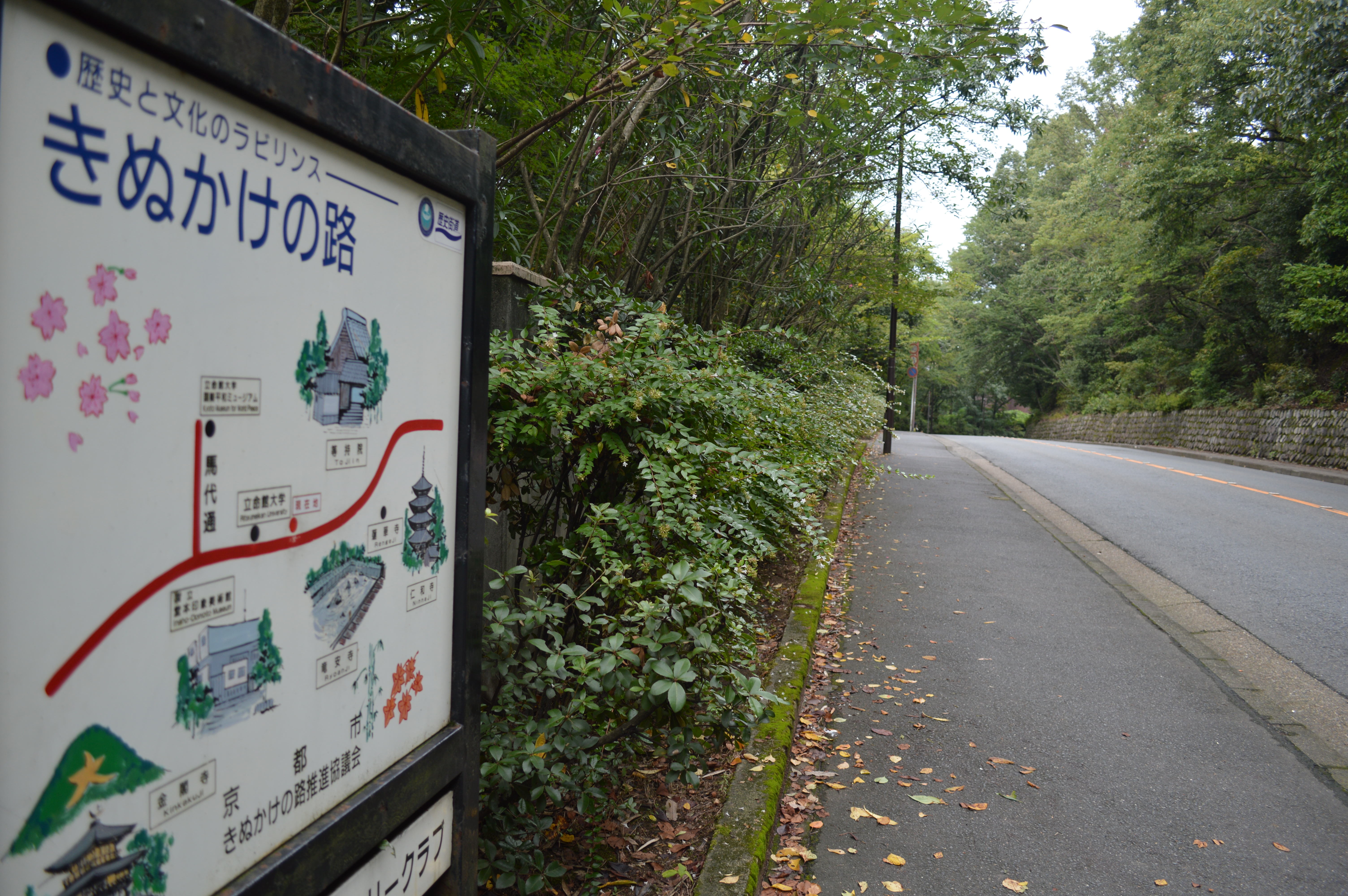 京都市にある「きぬかけの道」、立命館大学すぐ北側